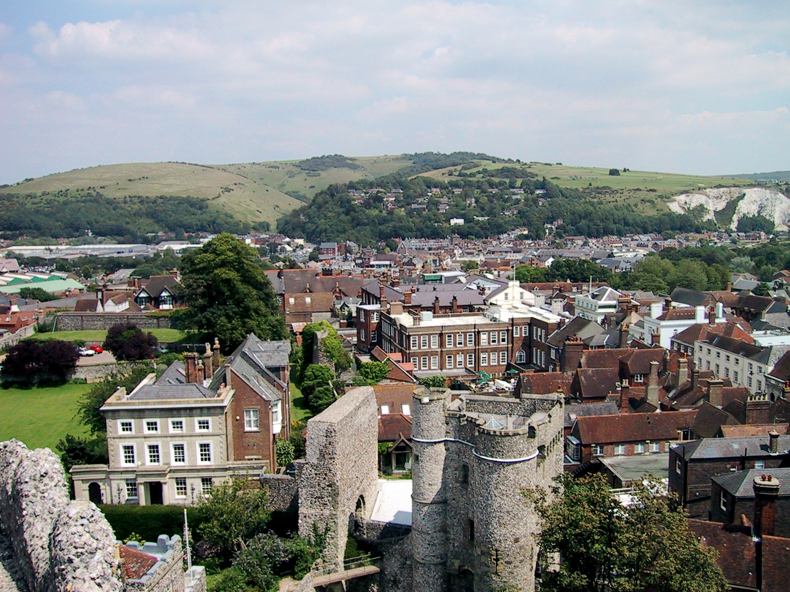 Udsigt over Lewes fra Lewes Castle